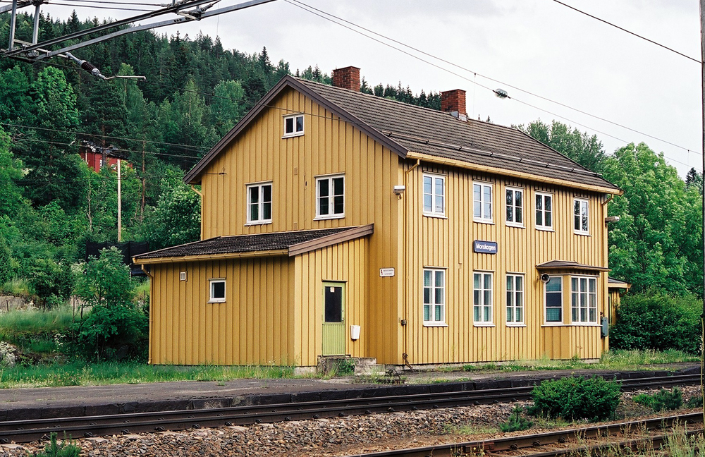 Morskogen stasjon, Hedmarksbanen.